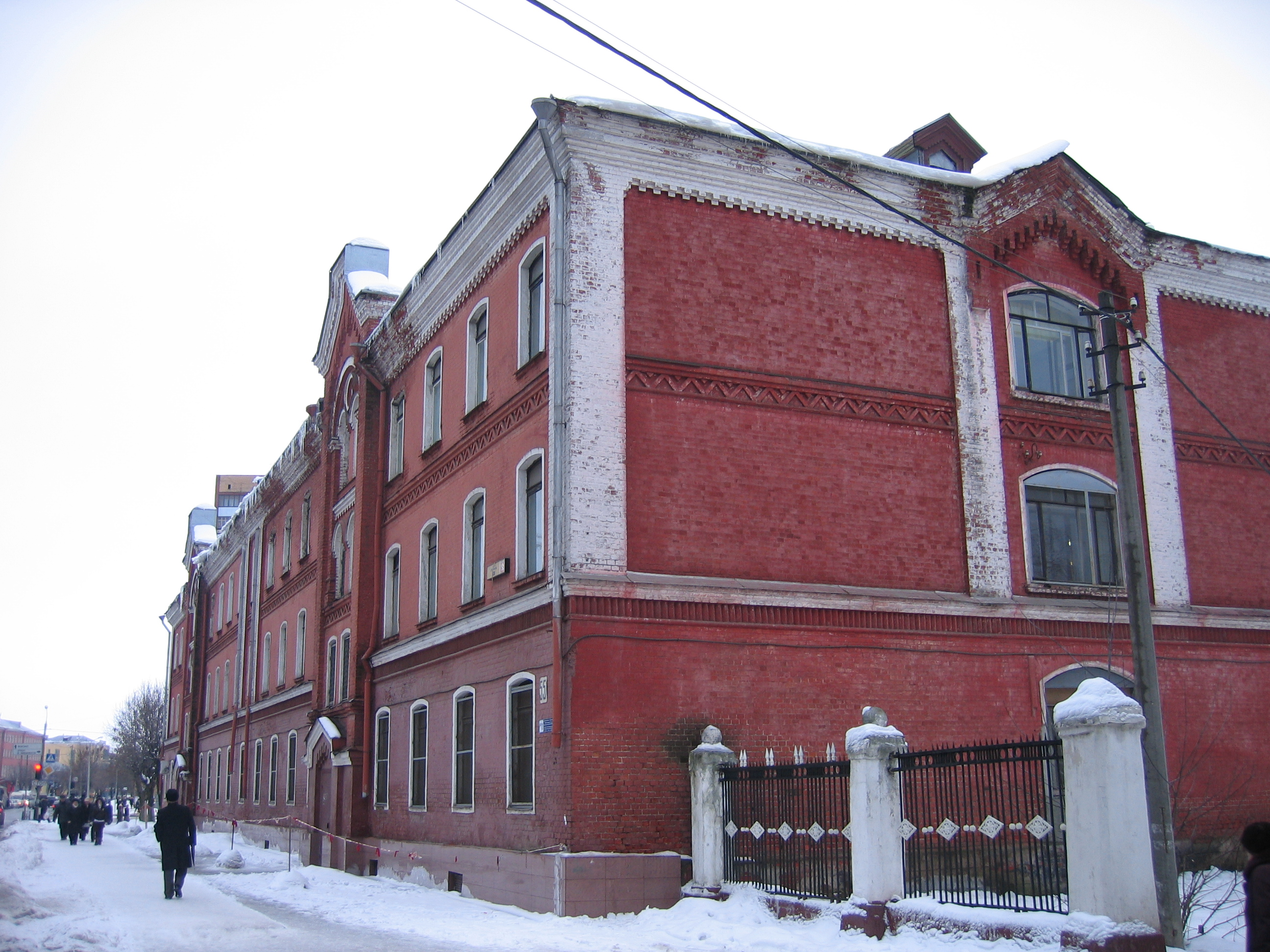 Eine alte Textilfabrik in Orechowo-Sujewo, Russland